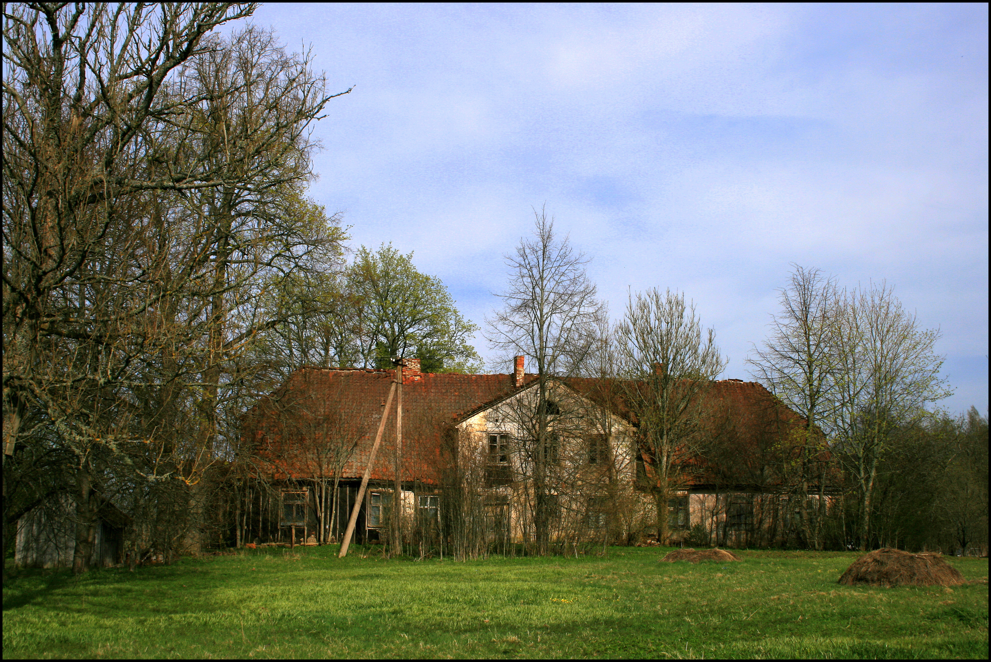 Kaltiki manor